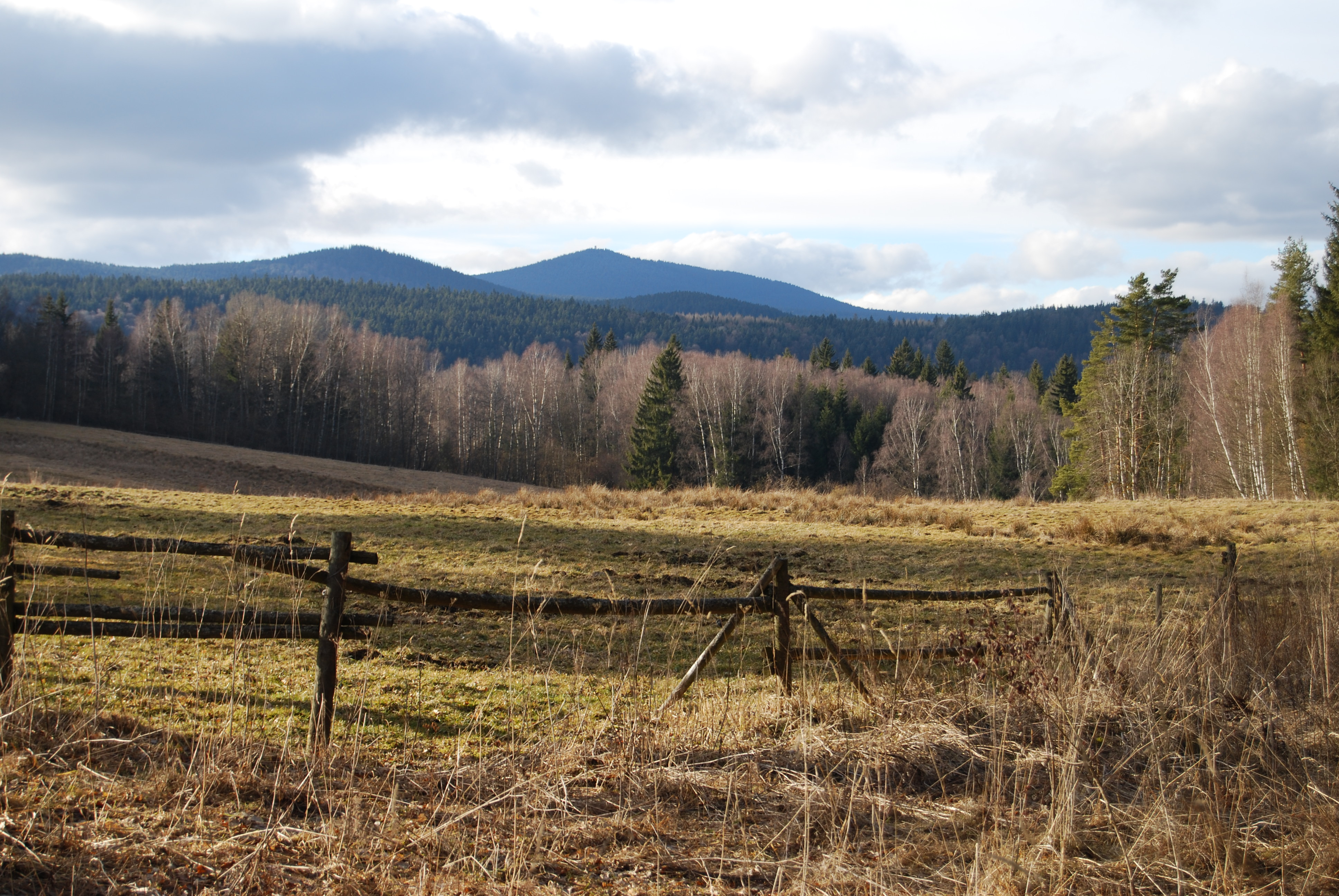 Pohled na okolí silnice 14136. V pozadí Boubín. Cudrovice (německy Zuderschlag) jsou zaniklá osada v okrese Prachatice, 5 km jižně od obce Záblatí. Okres Prachatice. Česká republika.